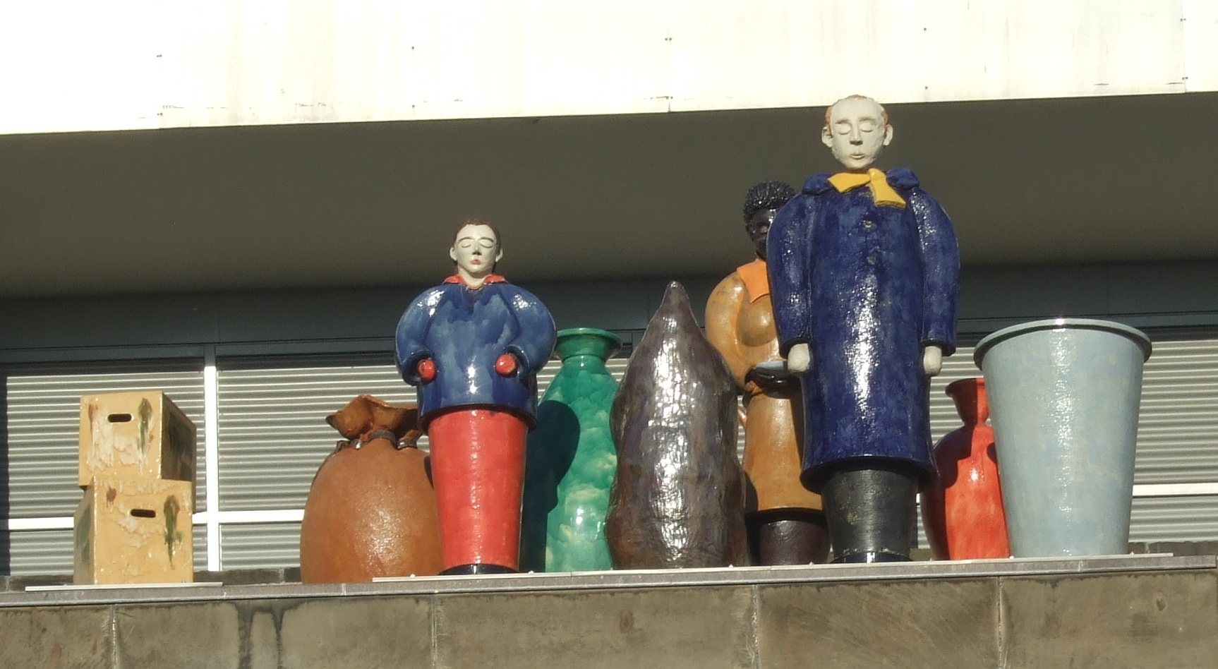 Reo tahiti: Kunstwerk "Die Fremden" von Thomas Schütte